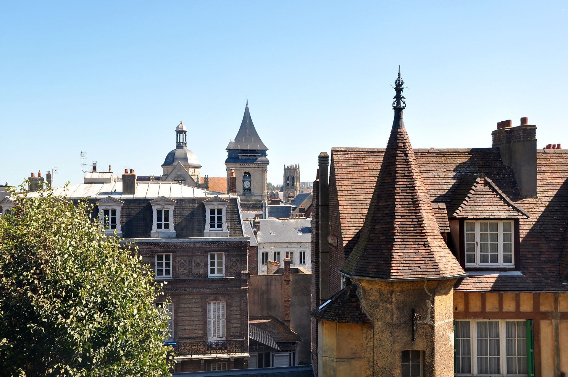 Dieppe und Kueste vom Chateau